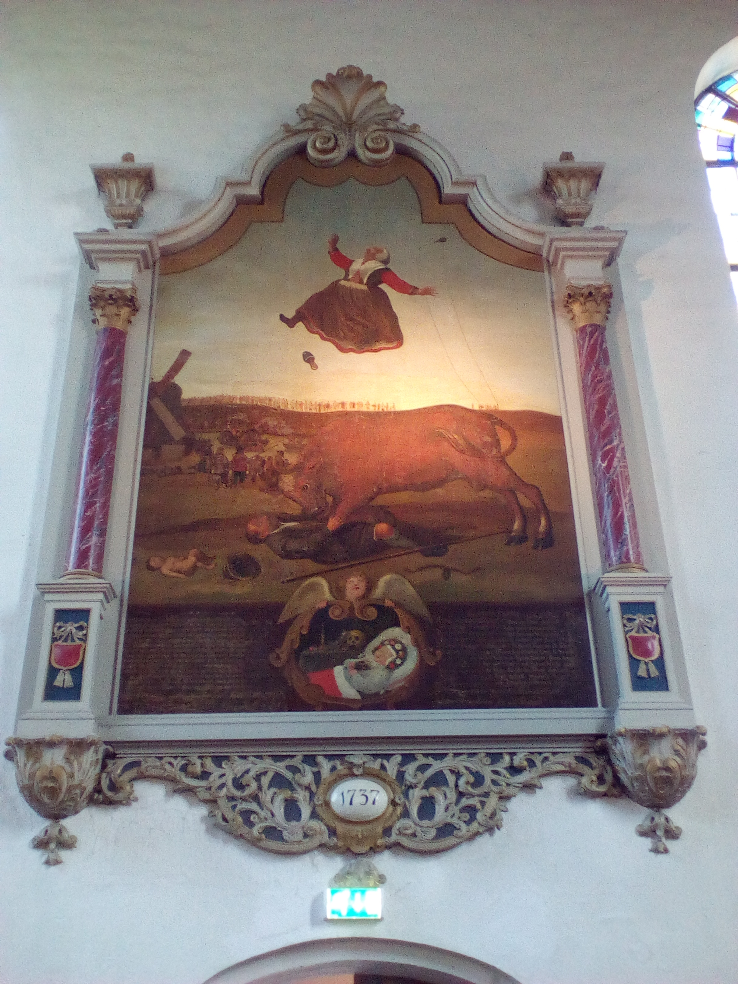 Schilderij boven de Noordelijke ingang van de Bullekerk in Zaandam die in een afbeelding het verhaal verteld van de boer die door een stier werd aangevallen, zijn vrouw die op de horens werd genomen en het kind dat daardoor geboren werd.